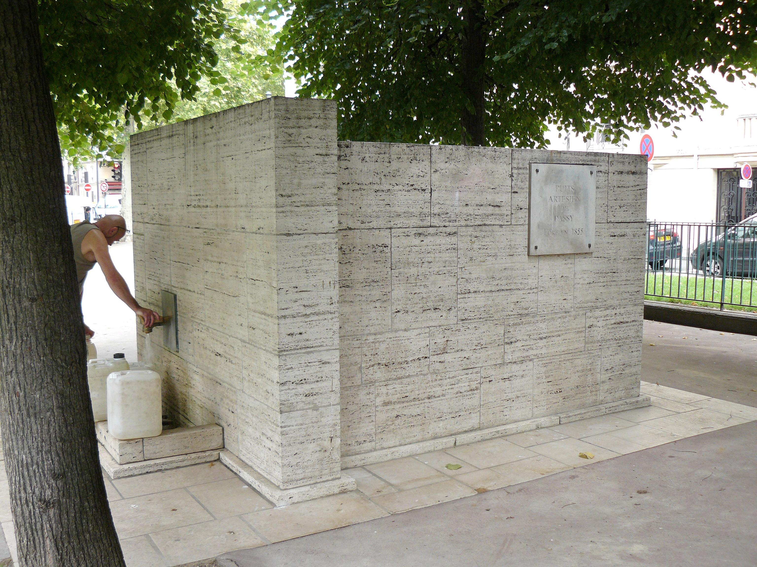 Le puits artésien (forage de Passy 1855) dans le square Lamartine, rue Henri-Martin (16e arrd. de Paris) - édicule rénové en 1994.